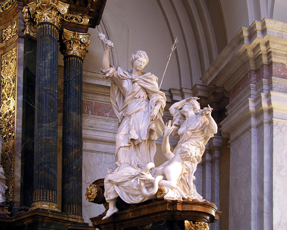 Gustav Vasakyrkan, höger altarstaty. Foto: Xauxa 2003 22 november 2004 kl.00.06 Xauxa 560x450 (103629 bytes) (Gustav Vasakyrkan, höger altarstaty. Foto: Xauxa 2003)